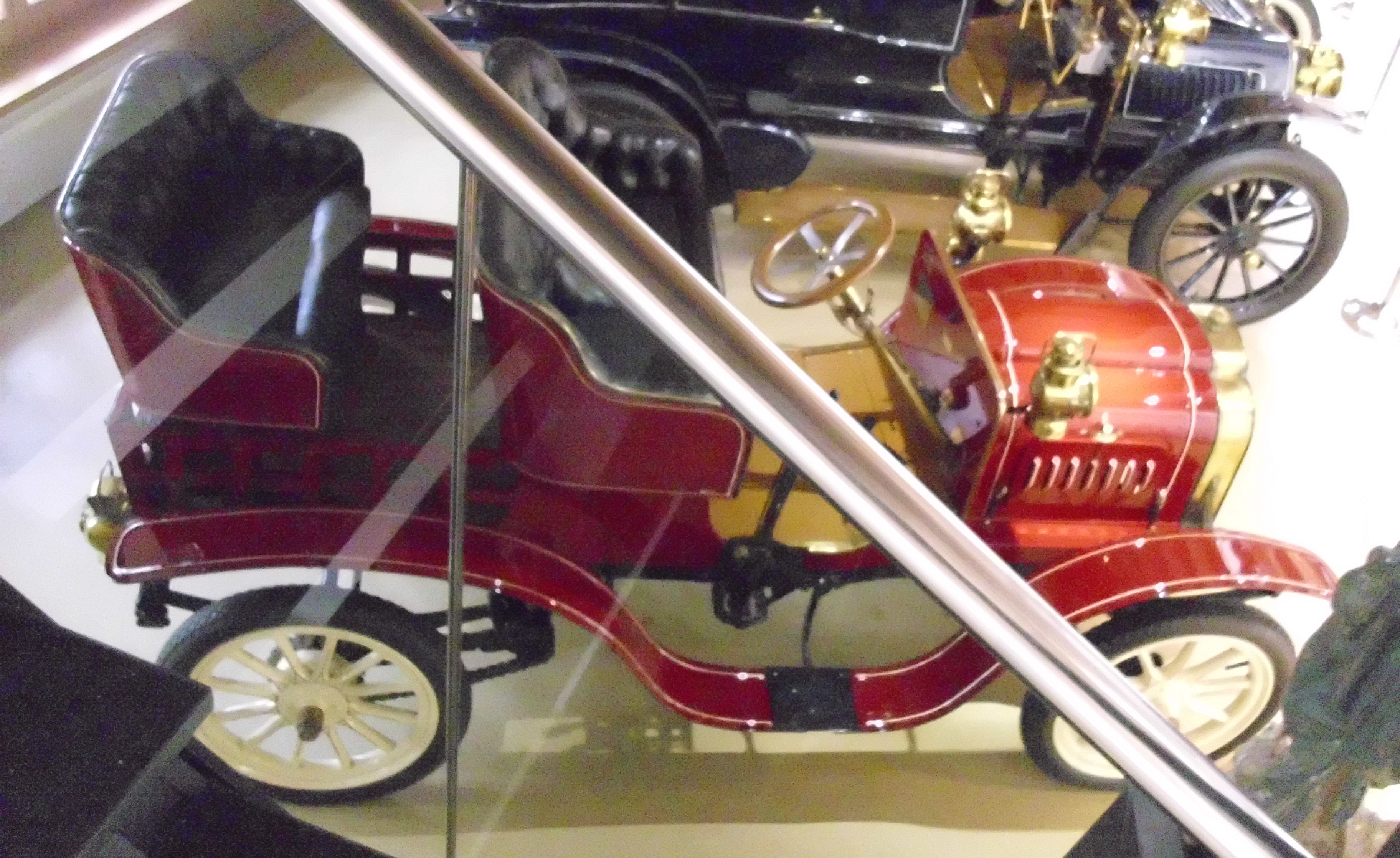 Orel 8 CV VL 08 1907 im Seppenbauer Automuseum in Sankt Salvator